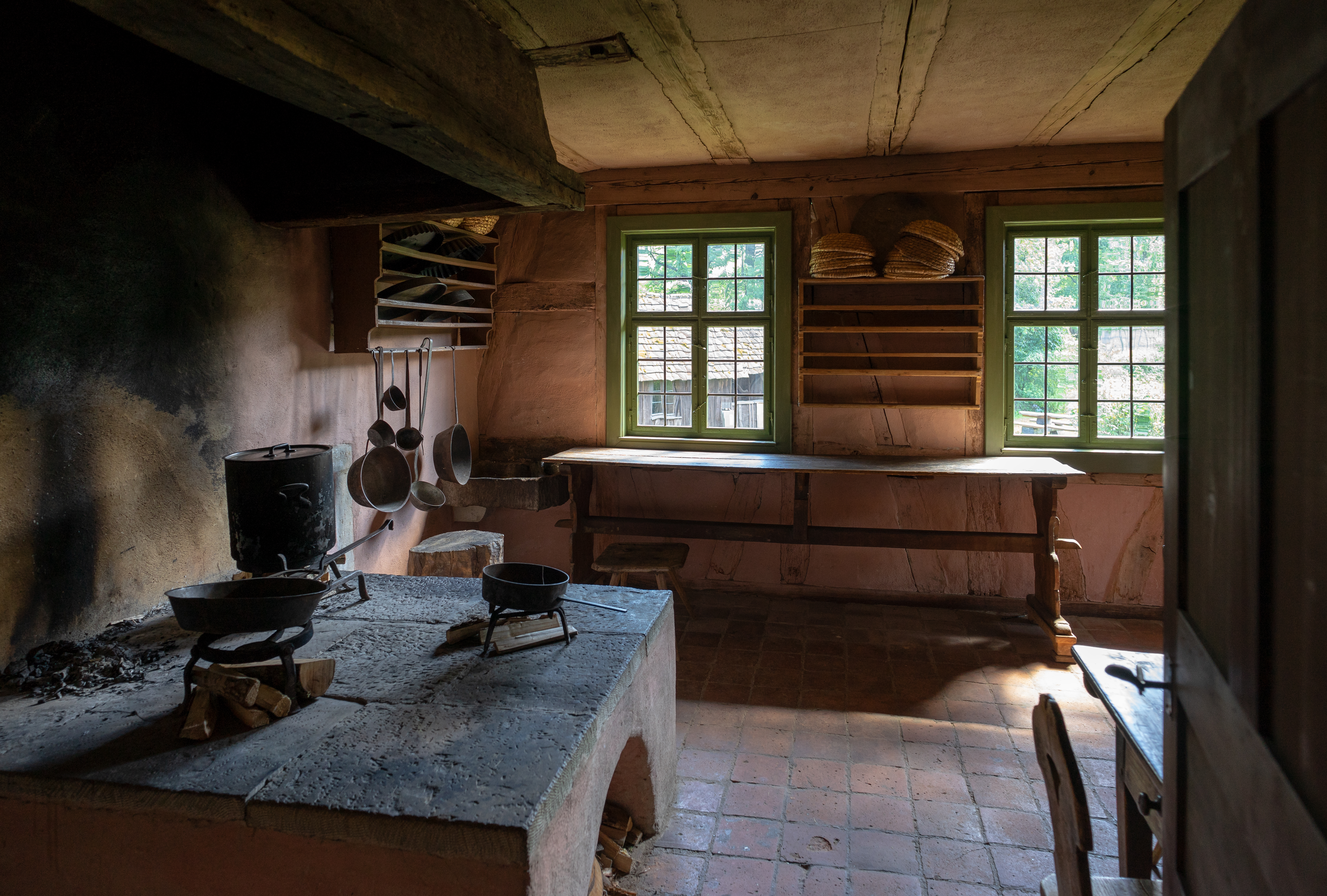 Hohenloher Freilandmuseum in Wackershofen bei Schwäbisch Hall: Baugruppe Steigenhaus, die Küche im Steigengasthaus Rose aus Michelfeld.